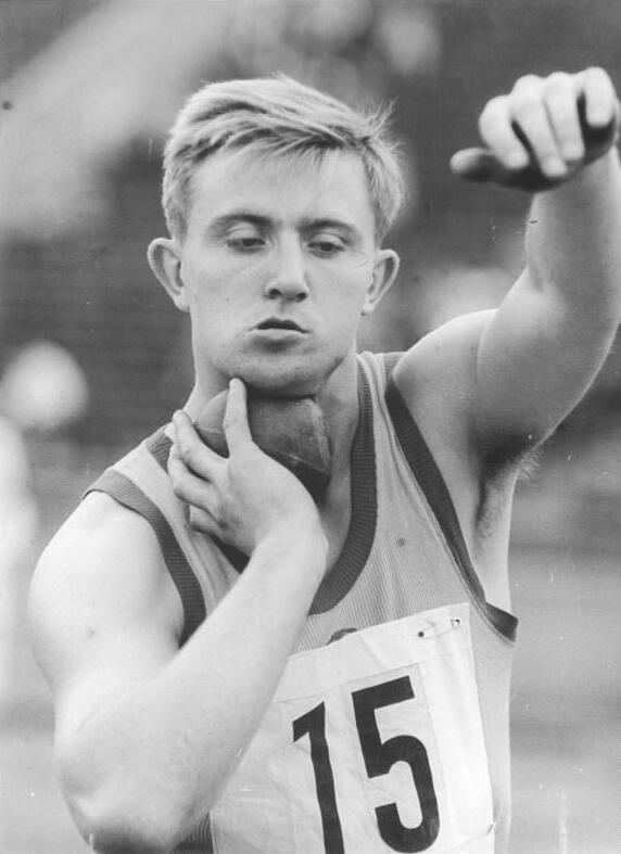 Peter Gratz Zentralbild DresselSd-Qu 25.07.1960 Deutsche Leichtathletikmeisterschaften im Zentralstadion in Leipzig vom 22.- 24.07.1960. UBz: Im Kugelstoßen erkämpfte sich Peter Kratz den Meistertitel.